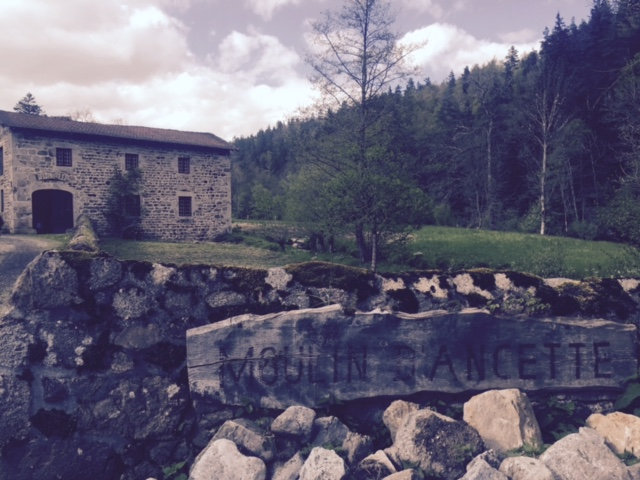 Moulin d'Ancette